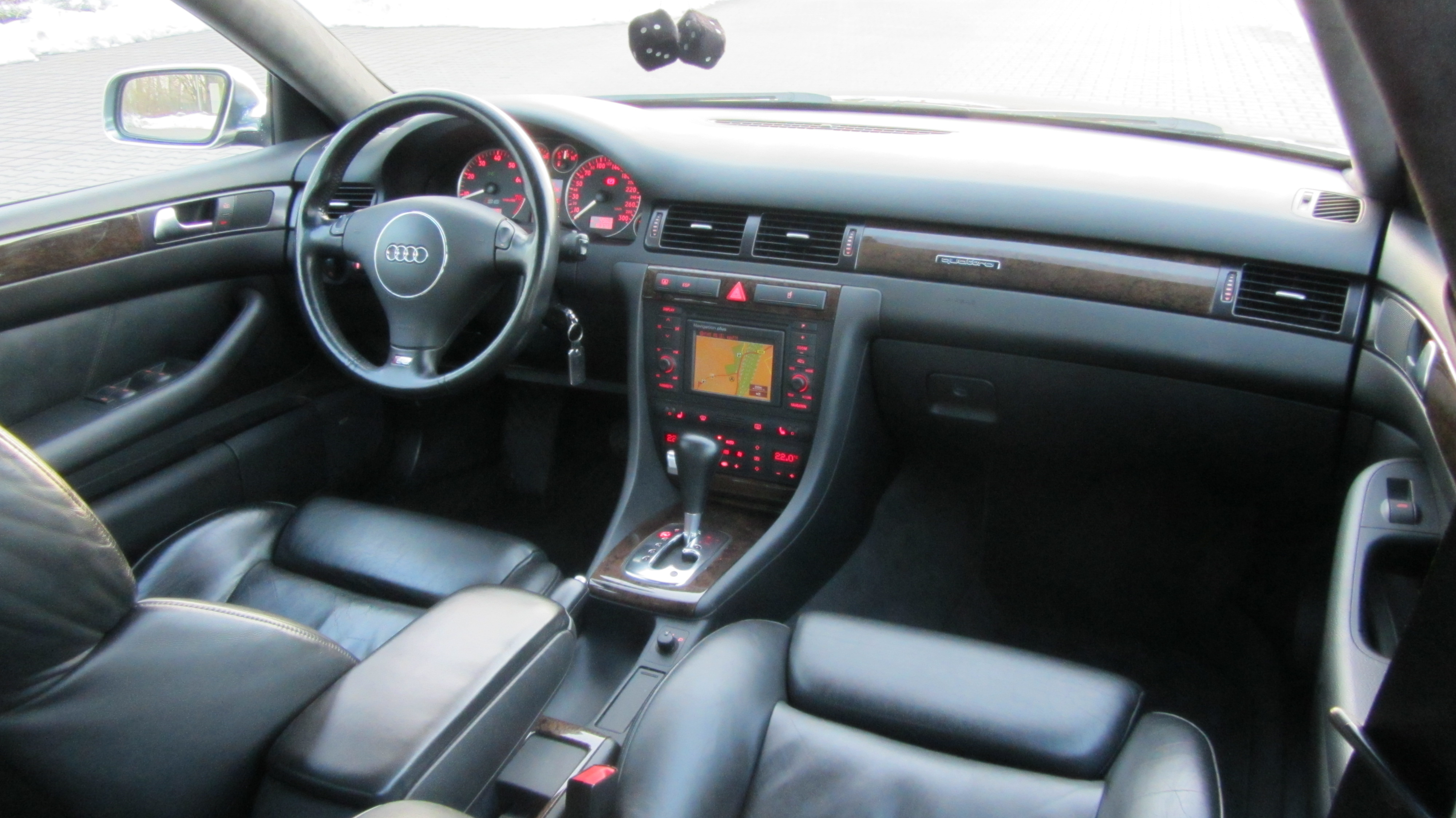 Innenraum Audi S6 C5 MJ 2002 mit Recaro-Sitzen, Dekorelement Birkenmaser Holz Grau, Navigation Plus, Alcantara Himmel schwarz